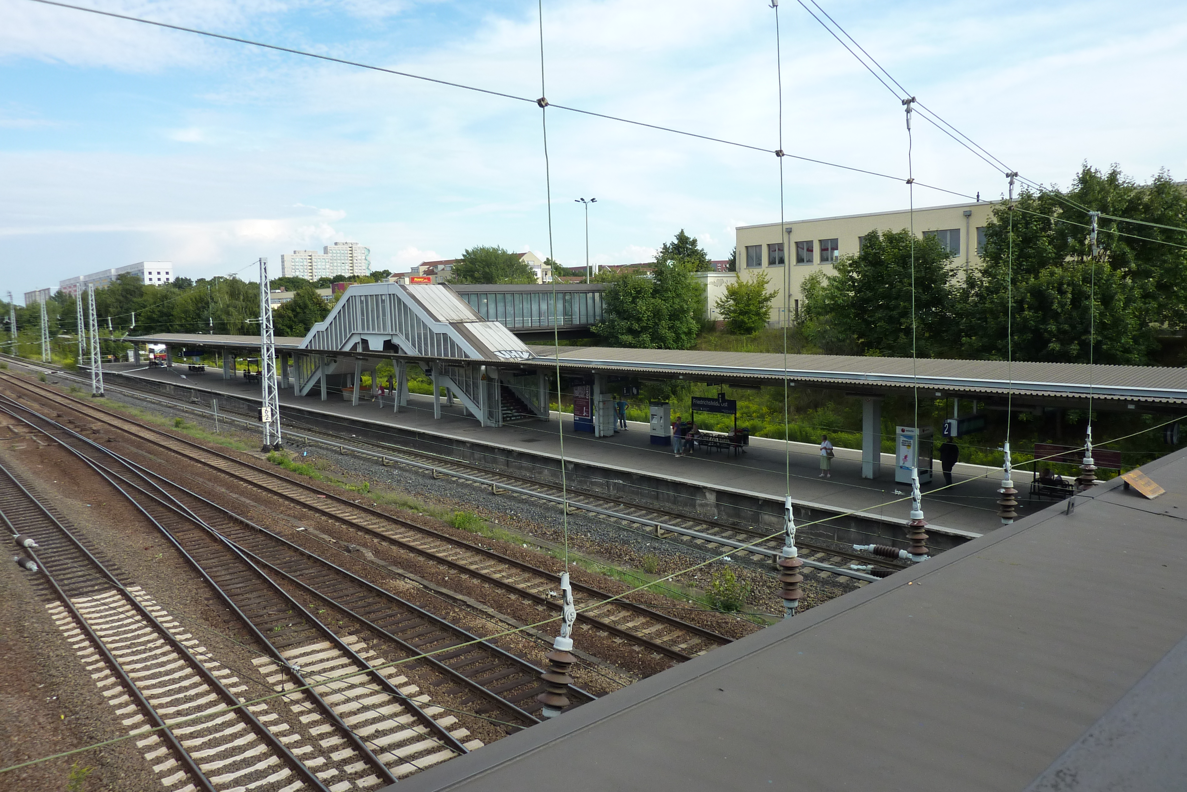 Blick auf den S-Bahnhof Berlin-Friedrichsfelde Ost von der Brücke Rhinstraße aus.